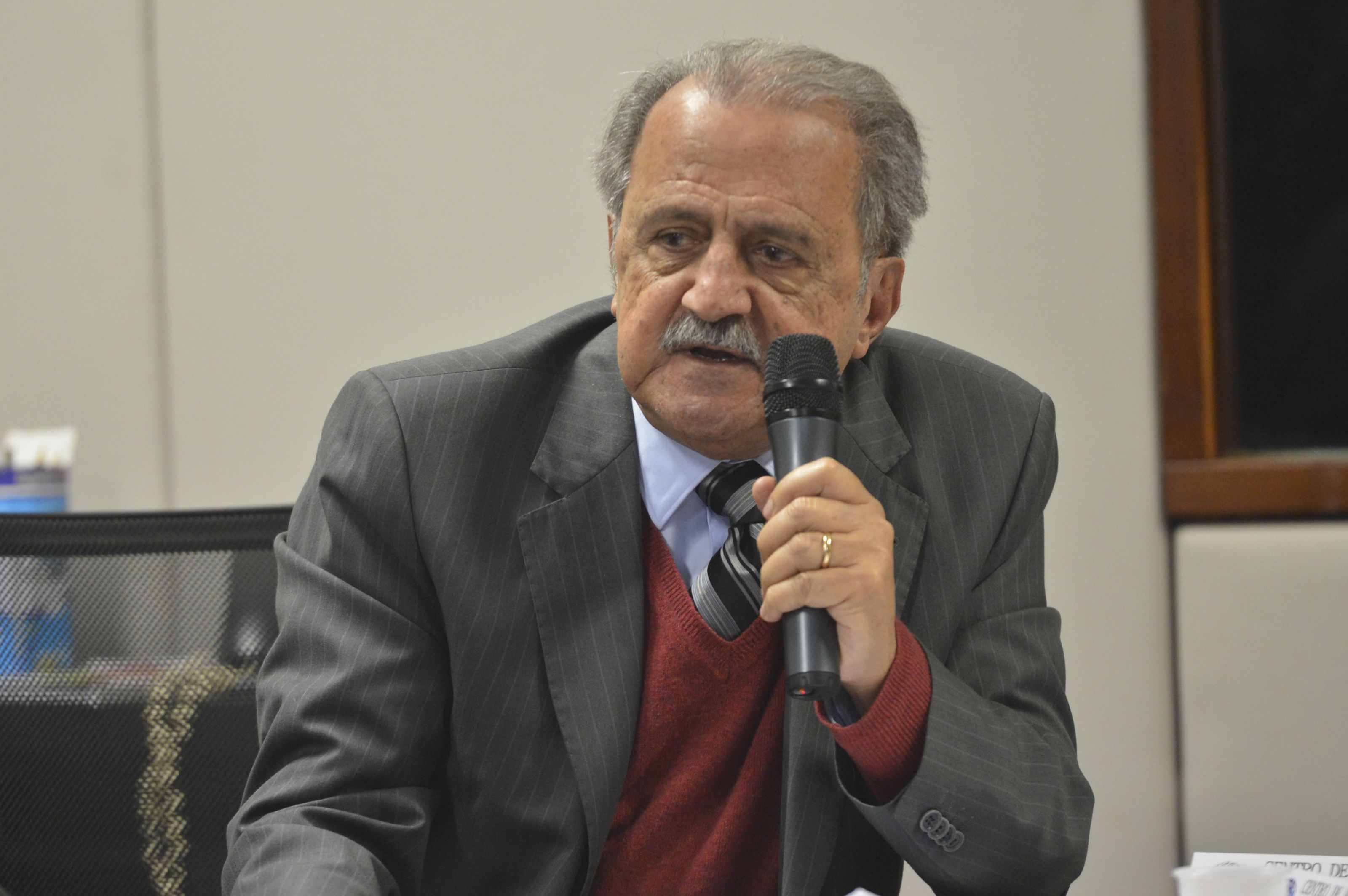 Brasília - O ex-ministro da Fazenda Paulo Haddad fala sobre o modelo integrado de desenvolvimento regional